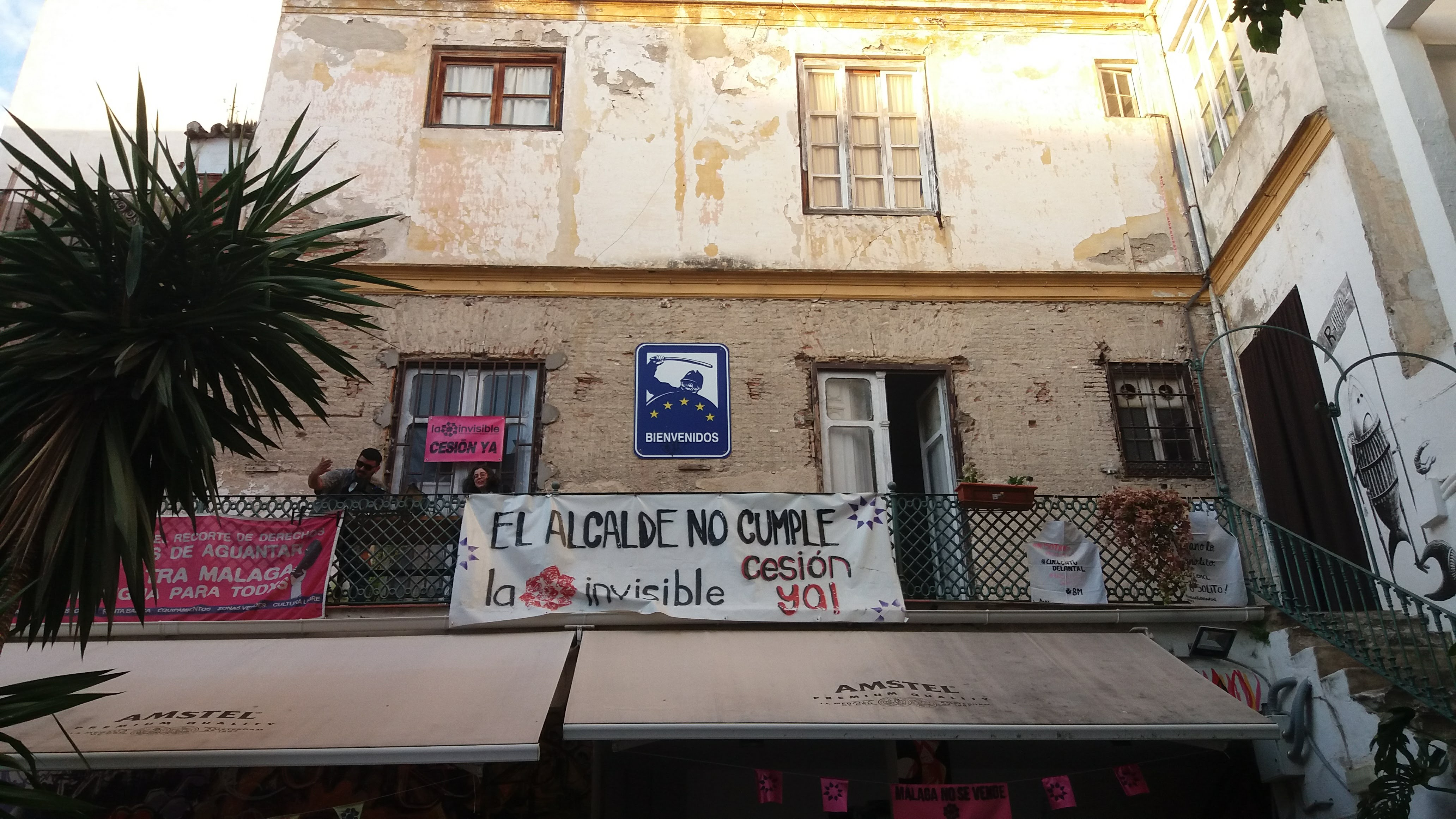 La Invisible, expuesta obra de Rogelio López Cuenca